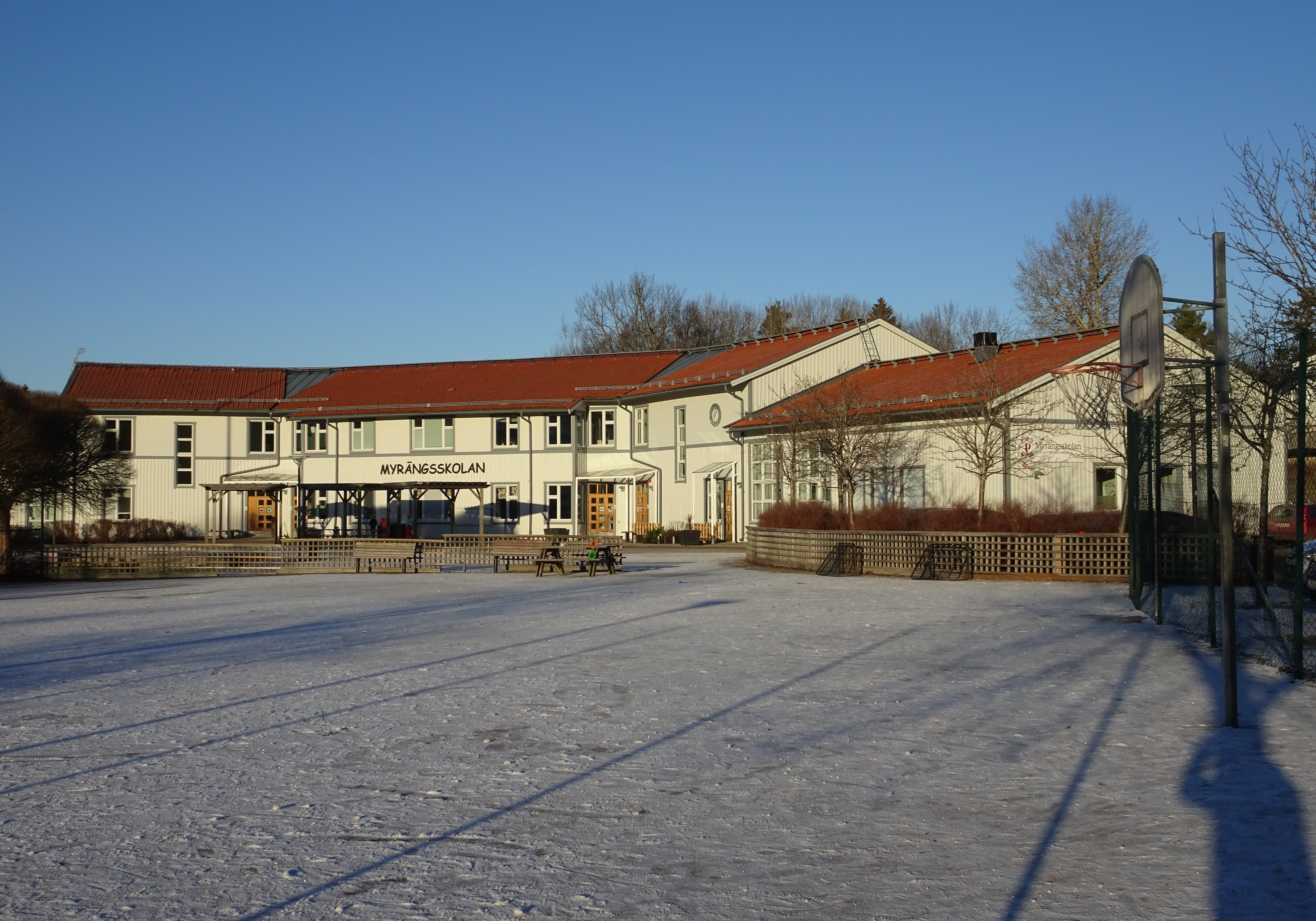 Myrängasskolan i Huddinge